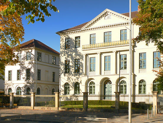 Laves Haus in Hannover Foto aufgenommen von Benutzer Benutzer:Axel Hindemith, Oktober 2005